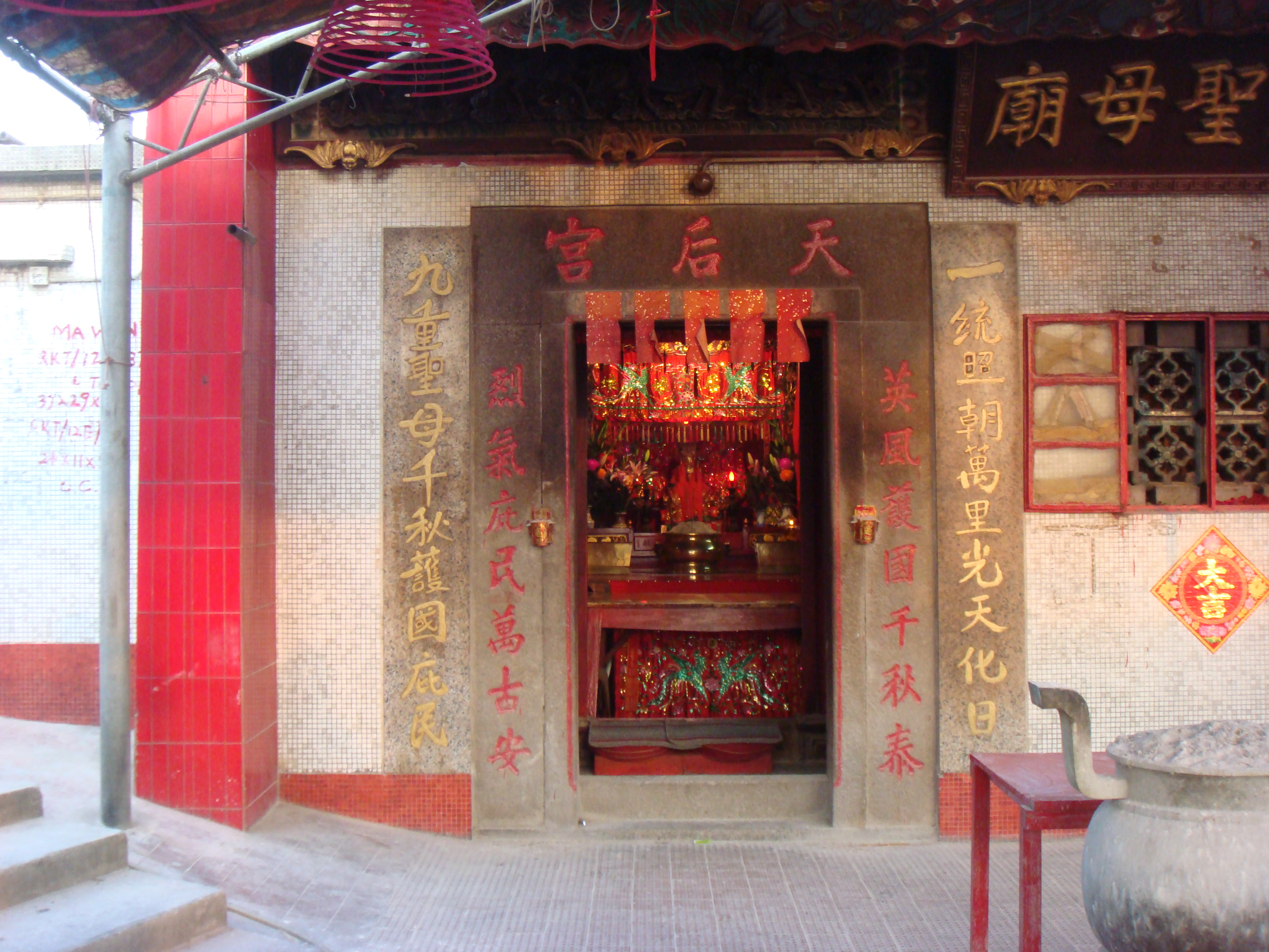 Tin Hau Temple in Lei Yue Mun, Kowloon, Hong Kong.